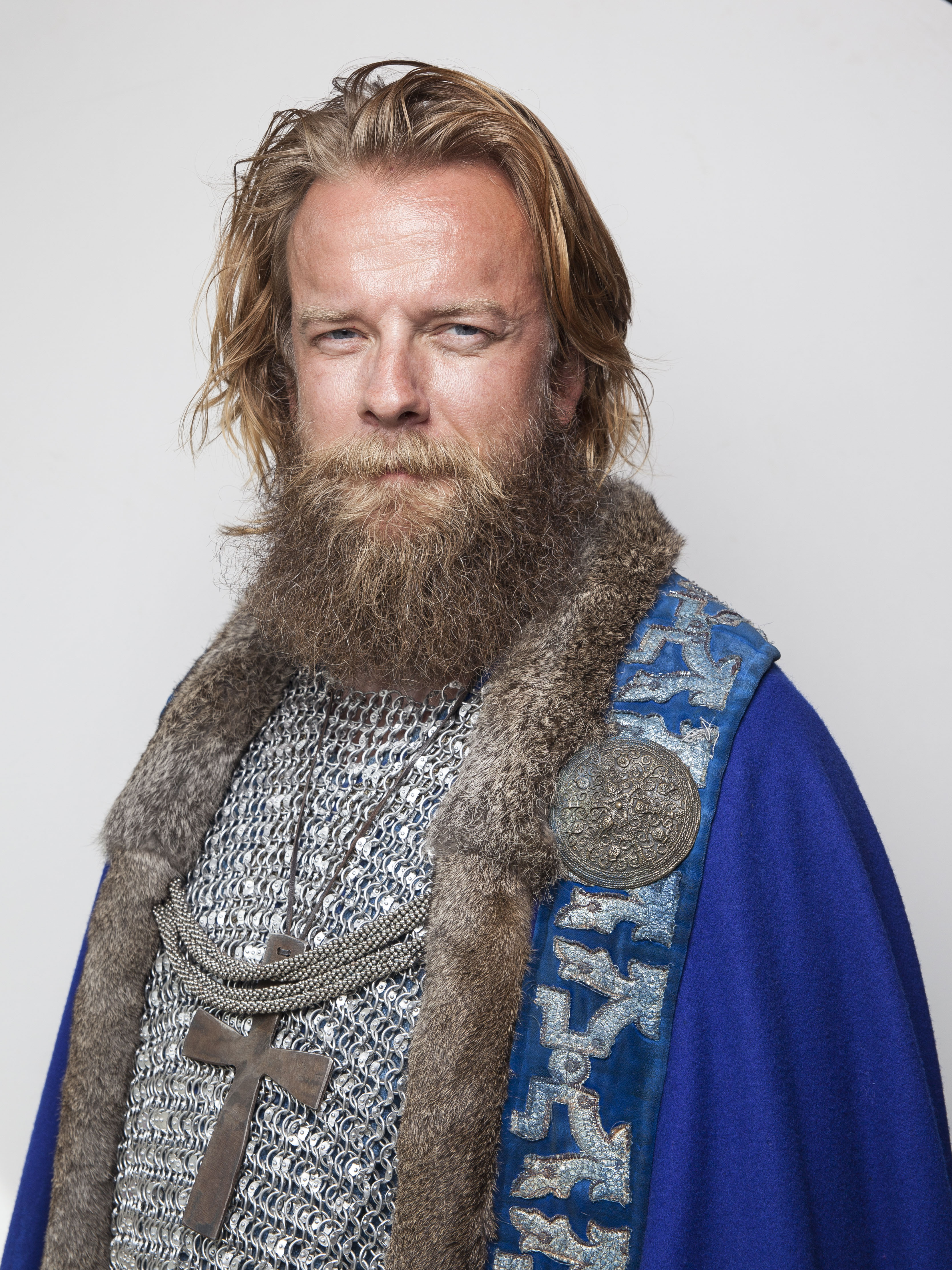 Norwegian actor Pål Christian Eggen as king Olaf II of Norway in the The Saint Olav Drama at Stiklestad 2014. Foto Espen Storhaug/SNK